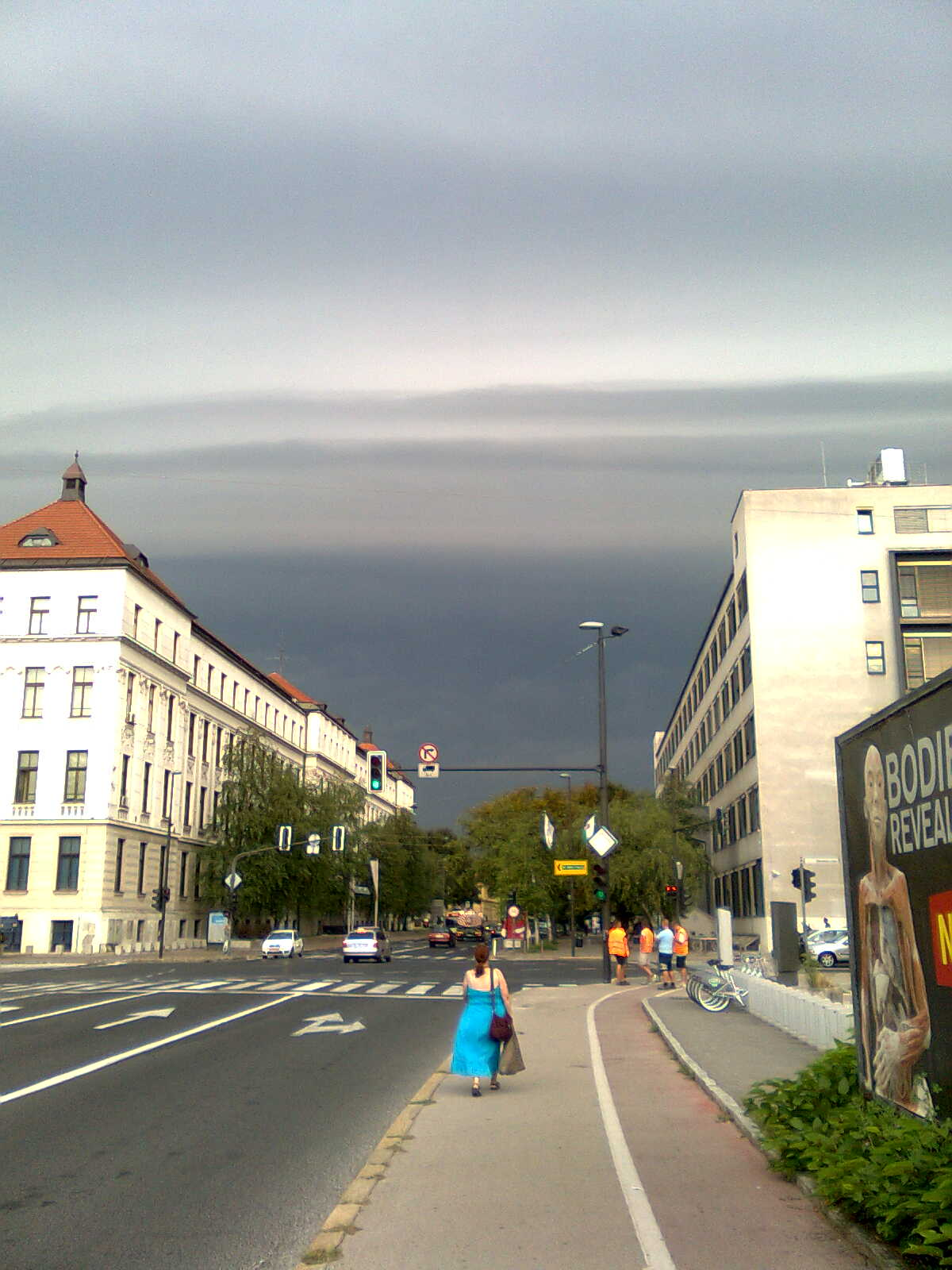 Nevihtna fronta, kakor je bila videti z Aškerčeve ceste v Ljubljani ob 8.46 (pogled proti zahodu), na dan balonarske nesreče.